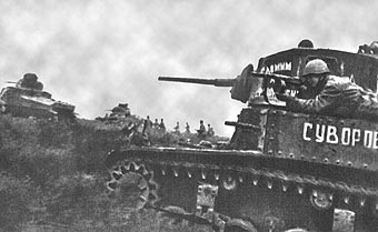 Tank Stuart M3 v bitvě u Stalingradu